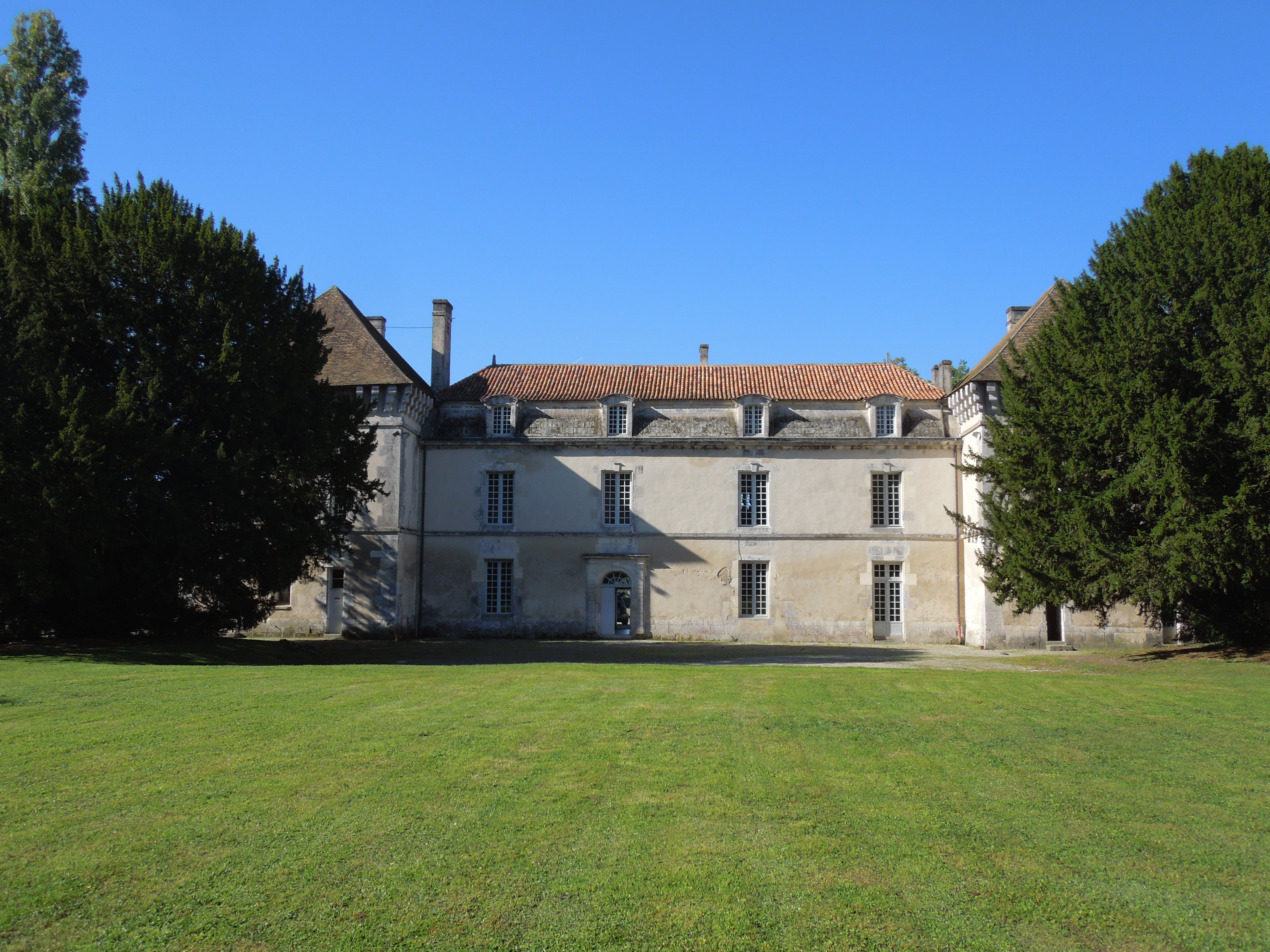 Das Château de Lignières in Lignières-Sonneville, Parkseite (von Osten)